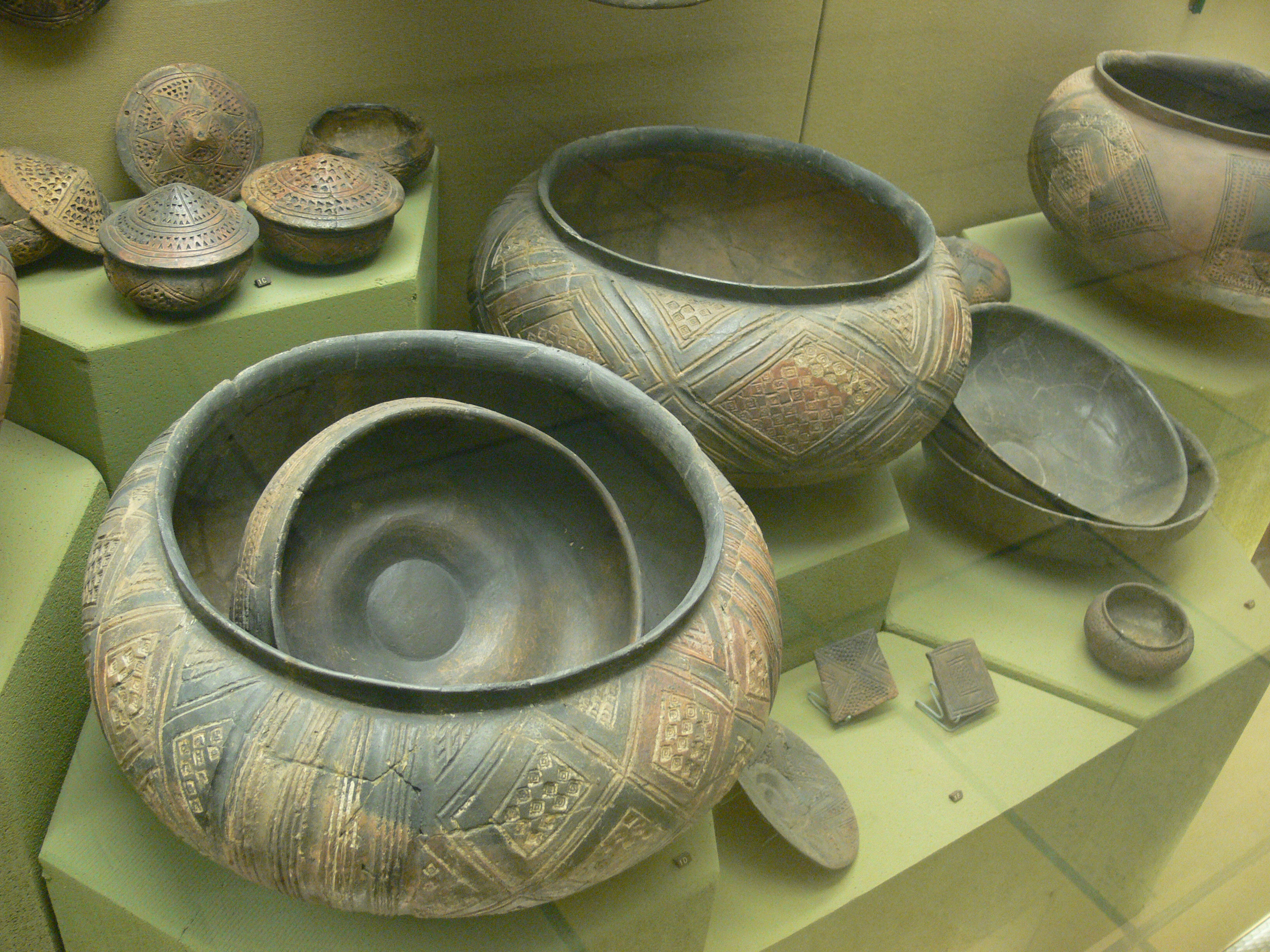 Gefäße, gefunden im keltischen Grabhügel "Hohmichele" der Hallstattzeit in Altheim (bei Riedlingen). Württembergisches Landesmuseum Stuttgart.